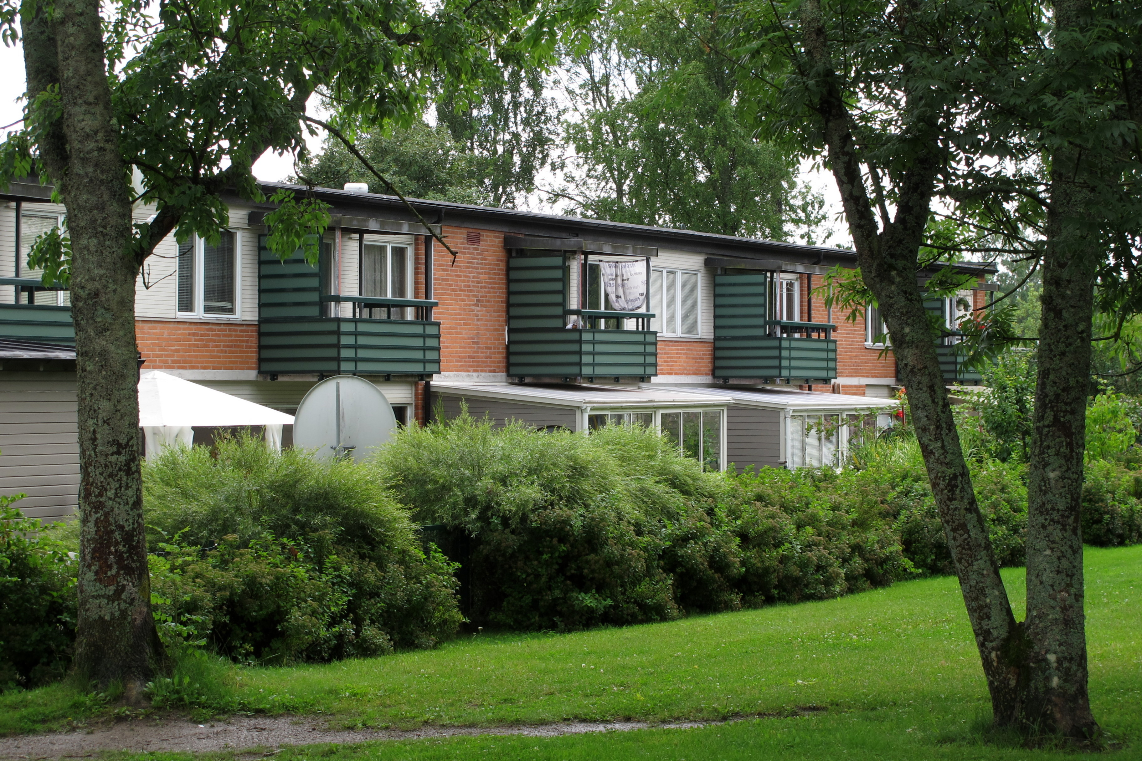 Vivalla i juli 2015